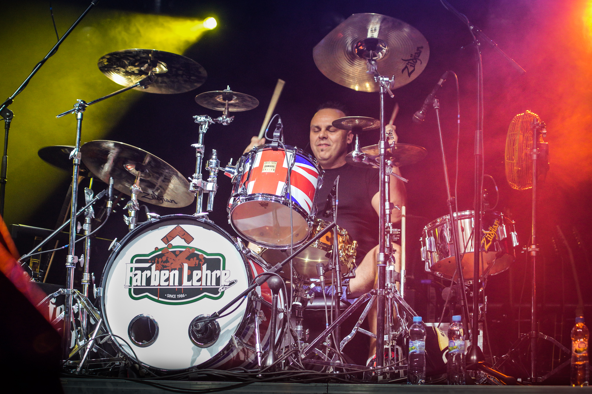 Zespół Farben Lehre podczas Rocket Festiwal 2014 w Warszawie.